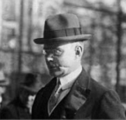 Gelegenheitsfotografie von Edgar Haniel von Haimhausen